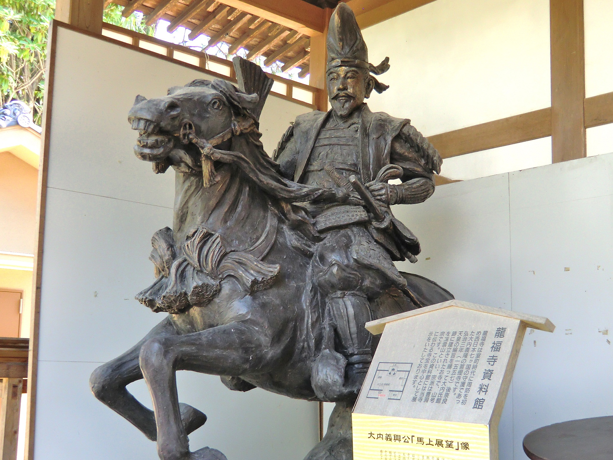 龍福寺（山口市）の資料館前にある大内義興像